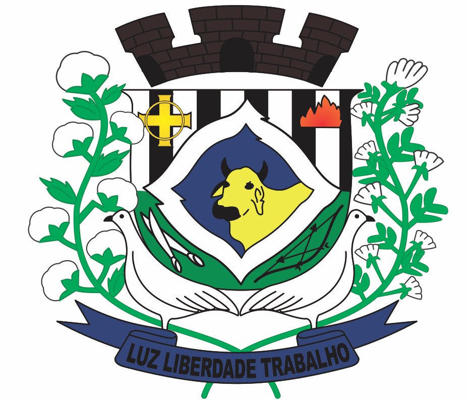 Brasão de armas de Anhumas - SP - Brasil.